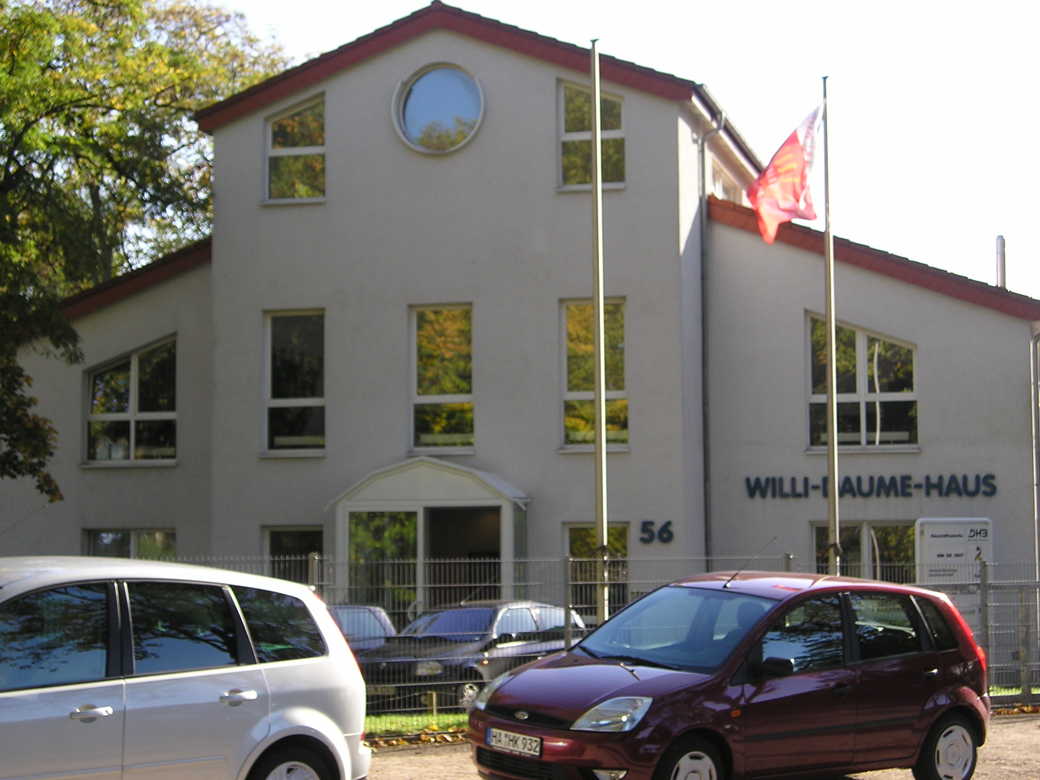 Das Willi-Daume Haus in Dortmund ist der Sitz des Deutschen Handball Bundes.